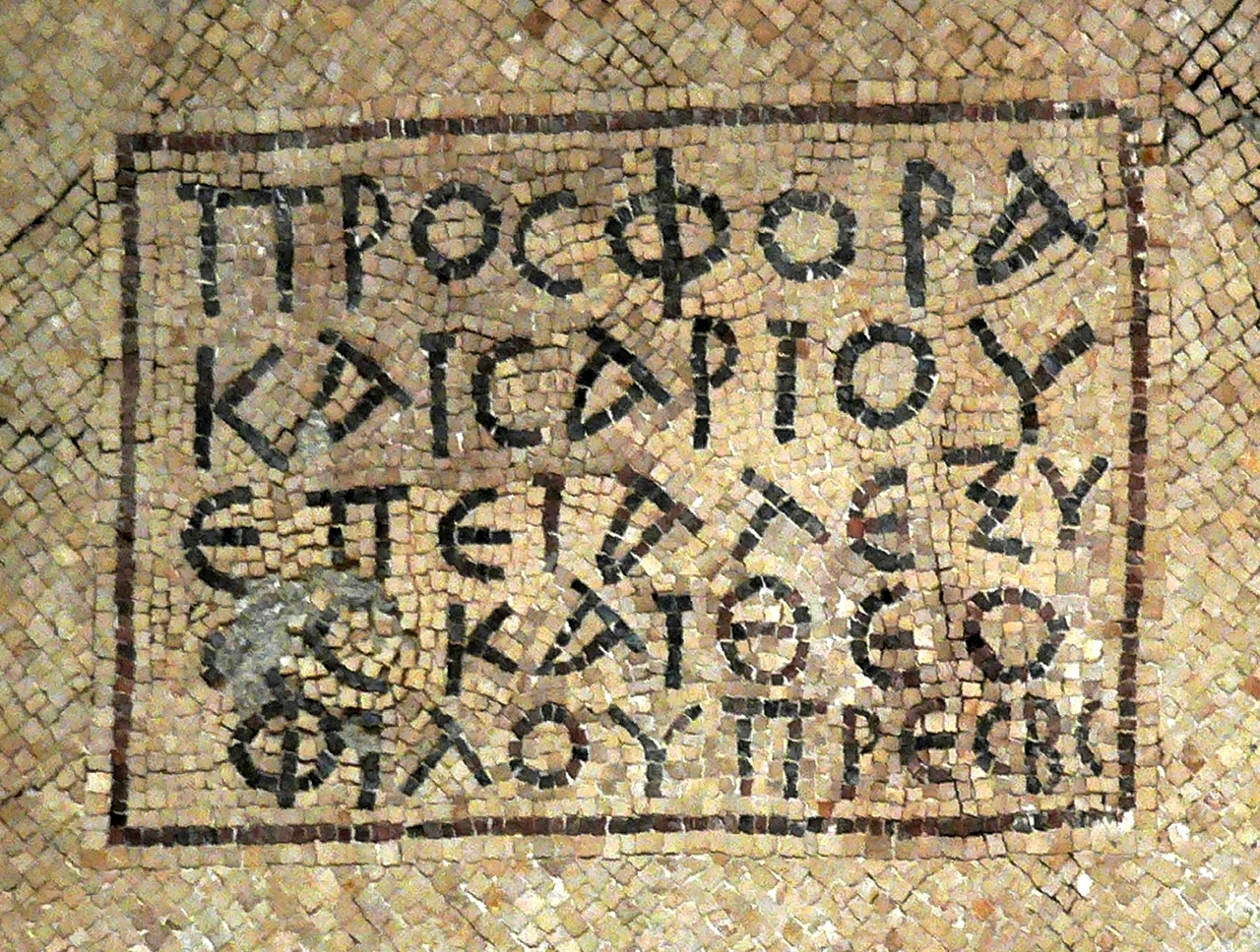 Inscription in Mount Nebo "Offering of Caesar at the time of Alexios and Theophilos priests" προσφορα καισαριου επει αλεξυ (ο)σκαι θεοφιλου πρεσβ(υτερο)σ